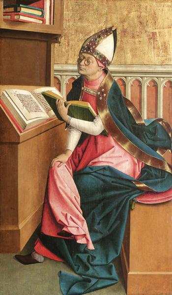 Bild des Heiligen Ambrosius, Kirchenlehrer des Frühmittelalter